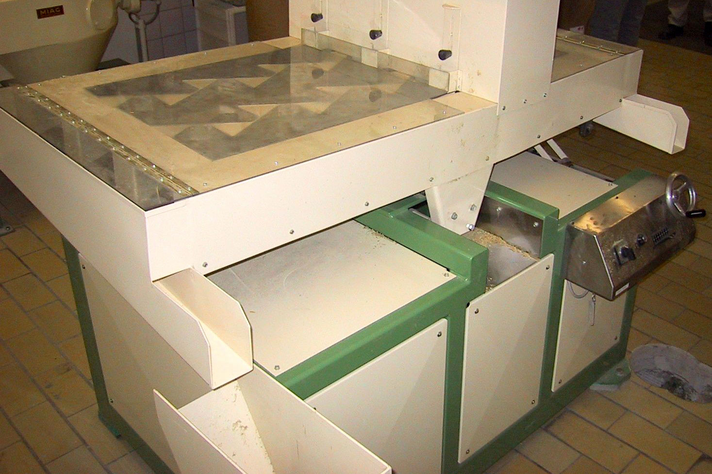 Tischausleser in einer Schälmühle